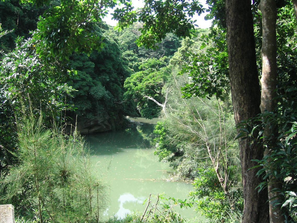 Yara Muruchi(broad of Hija river), Okinawa, Japan.(比謝川の屋良ムルチ)